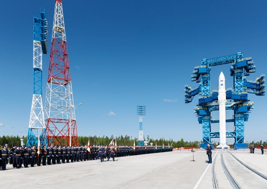 1-й Государственный испытательный космодром Министерства обороны Российской Федерации